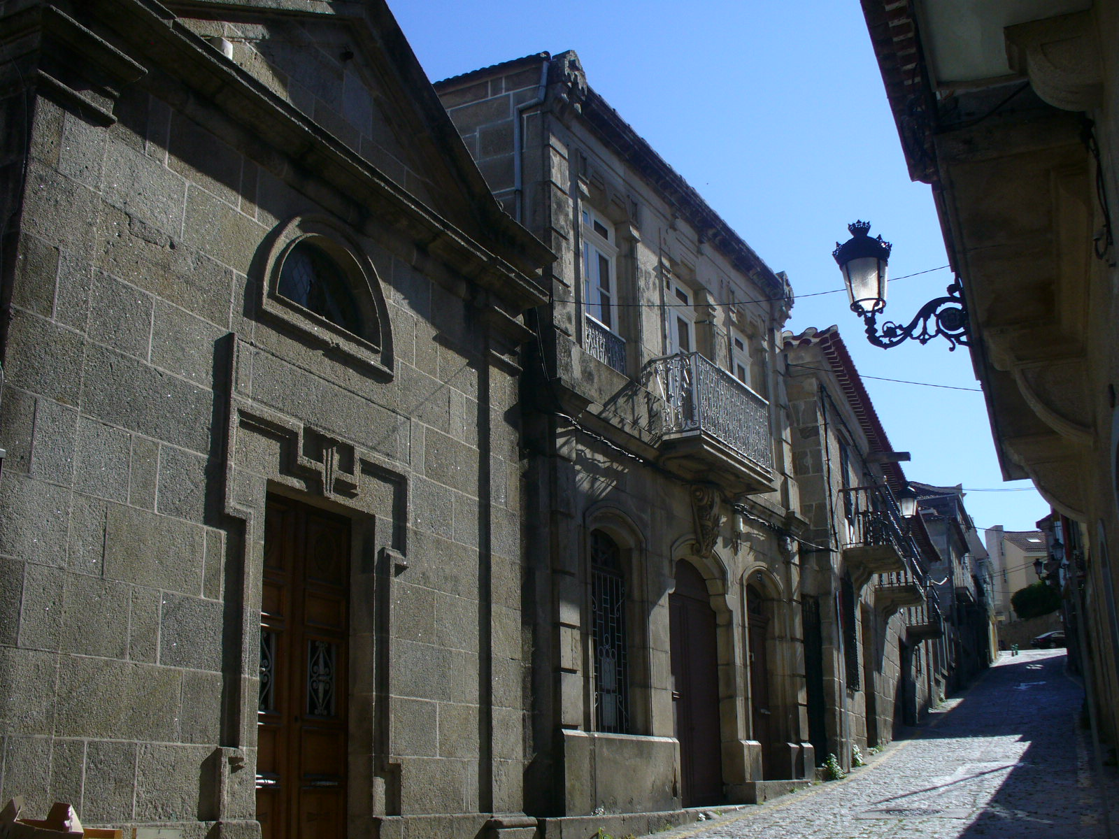 Strato de la Forghistoj, Bouzas, Vigo